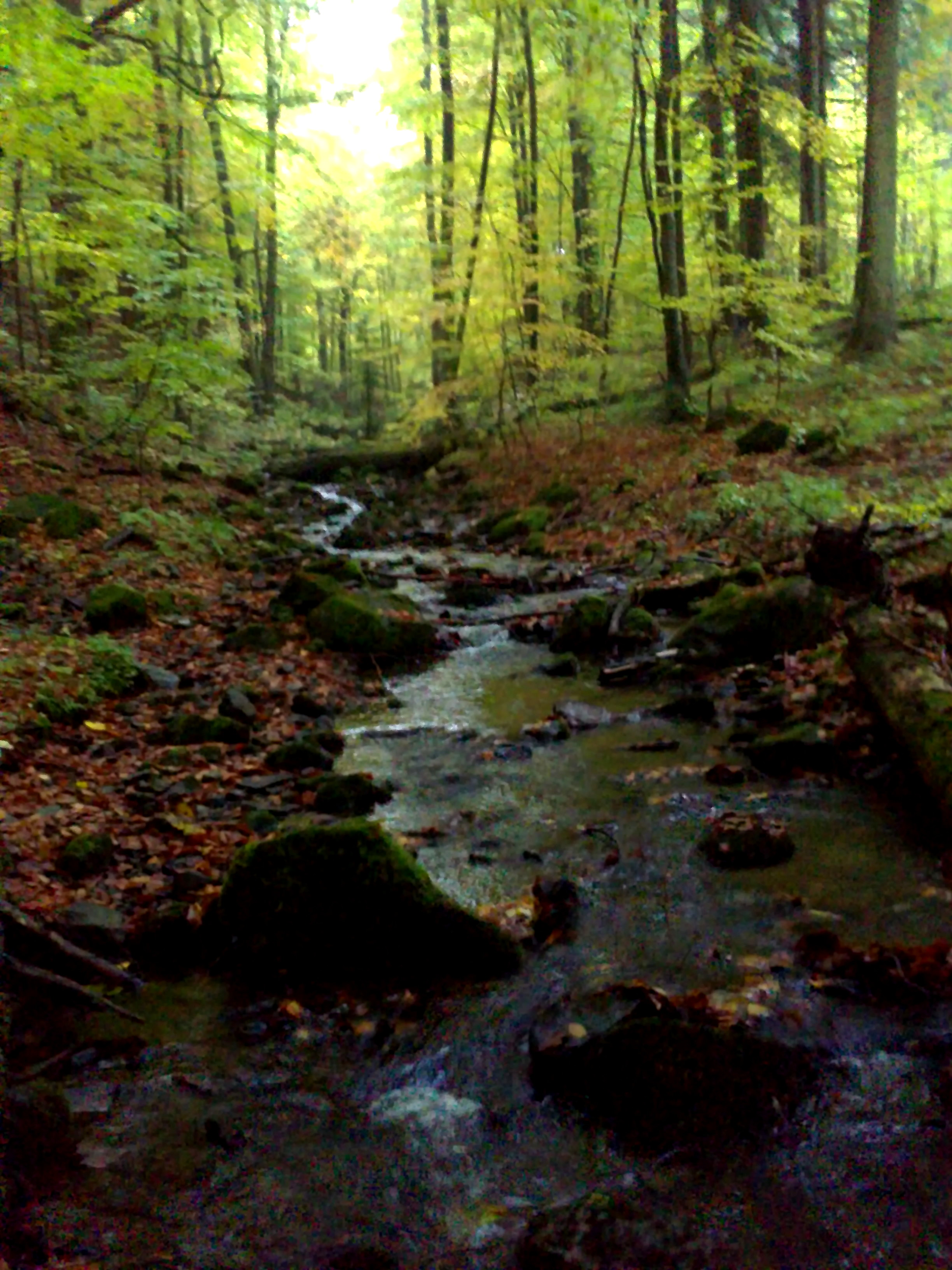 Pohľad na údolie Badínskeho potoka.